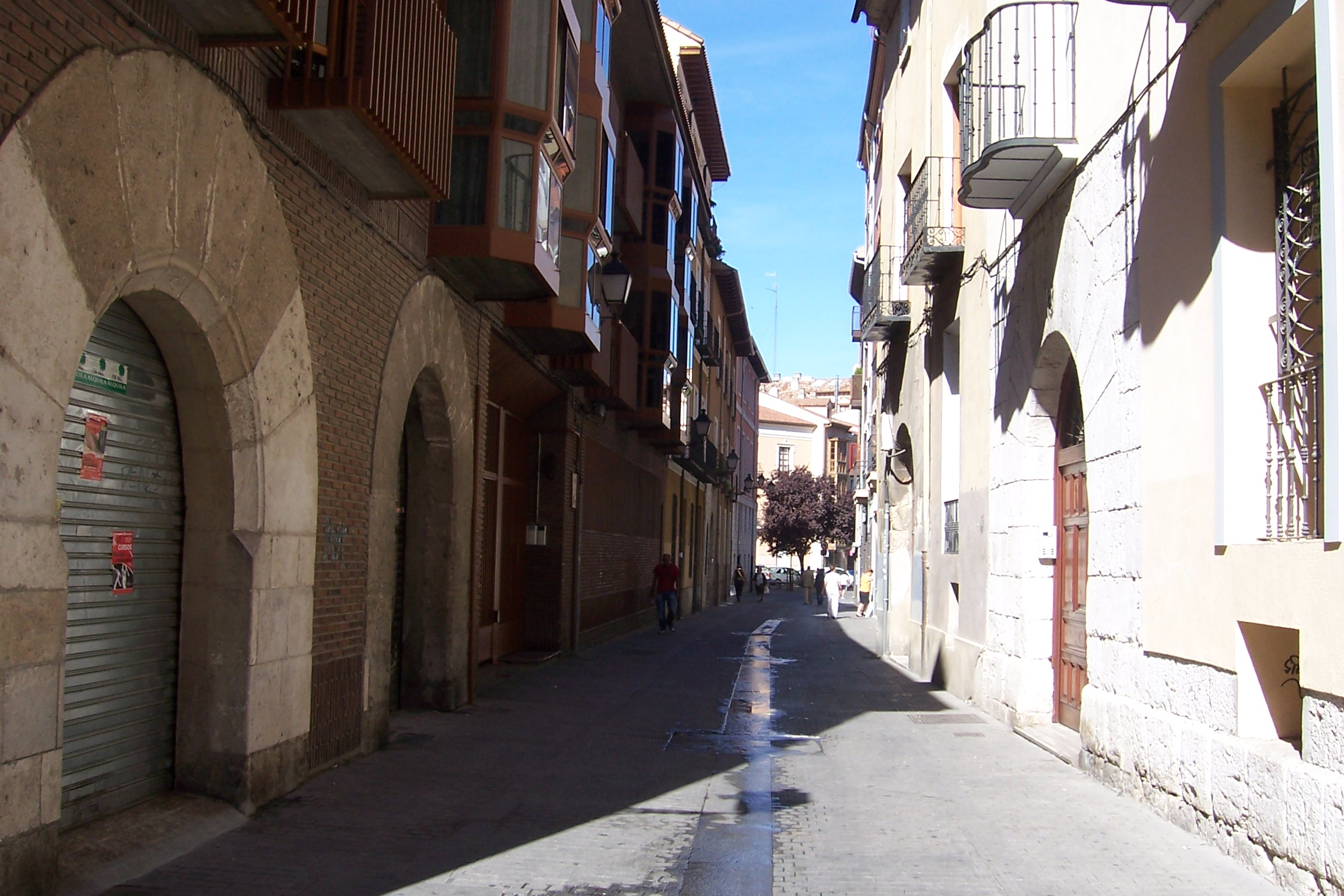 Puertas con dovelas de casas nobles del siglo XVI en la calle Juan Mambrilla de Valladolid (España). La calle de Don Juan Mambrilla es la antigua calle de Francos. Su nombre deriva de una huerta o granja que tuvo Martín Franco, en la época del conde Ansúrez. Albergaba palacios nobiliarios pertenecientes a letrados y funcionarios el Tribunal de Justicia.